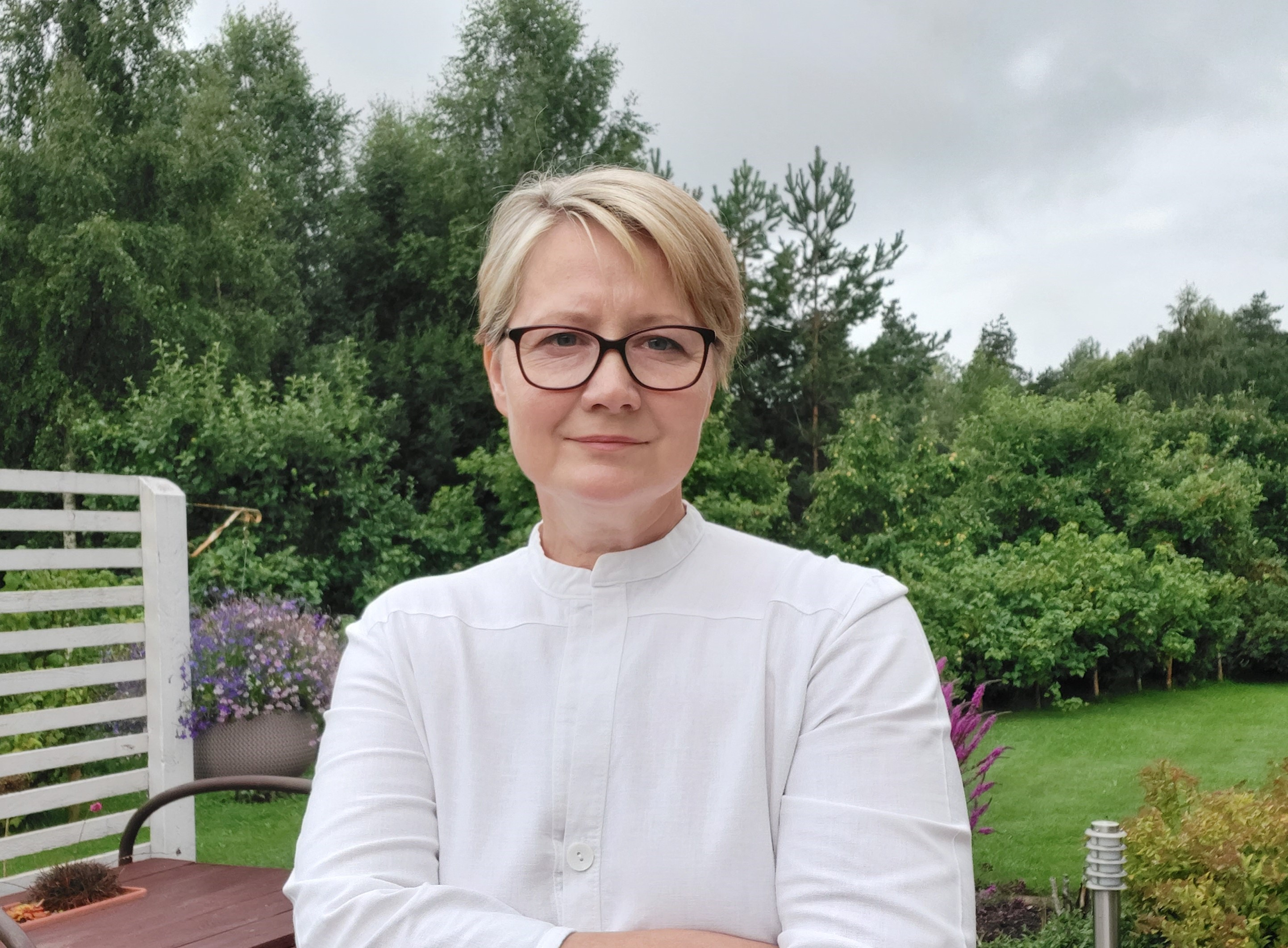 Jana Maasik